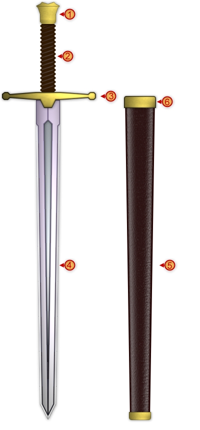 Konstruktion eines einhändig geführten Schwertes Grafik 1.